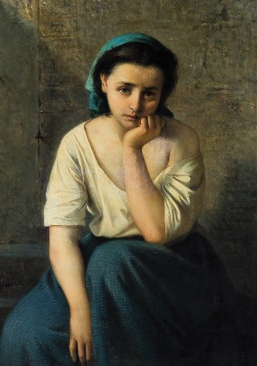 "La pensierosa", olio su tela, cm. 91X67